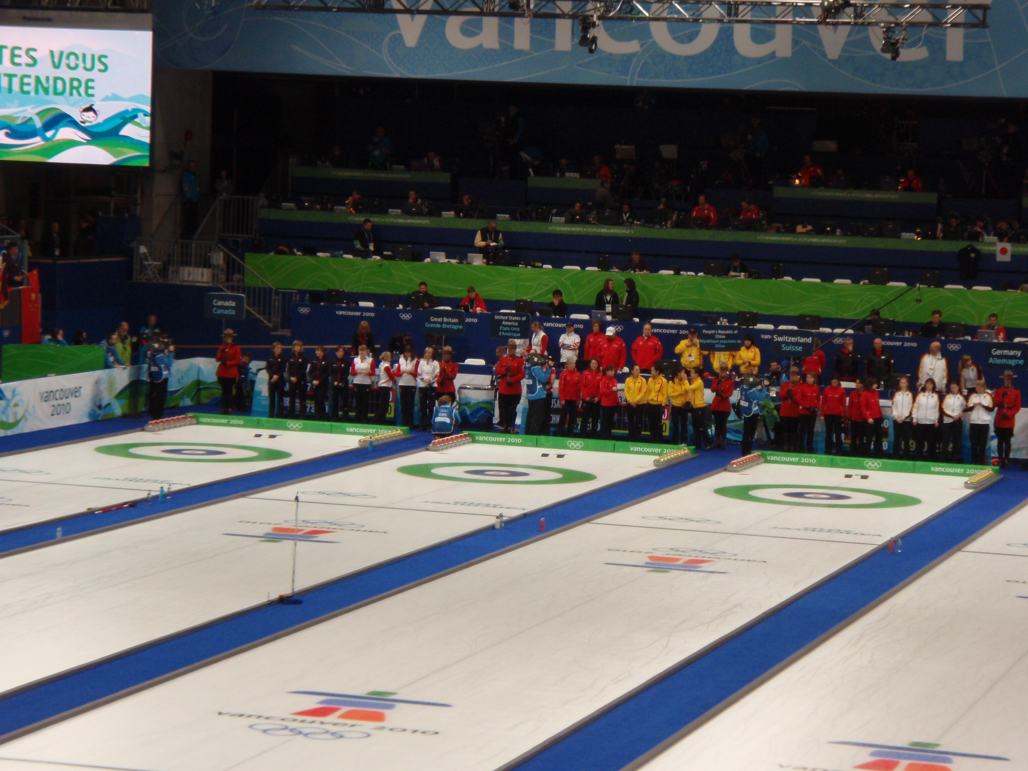 Before draw 11